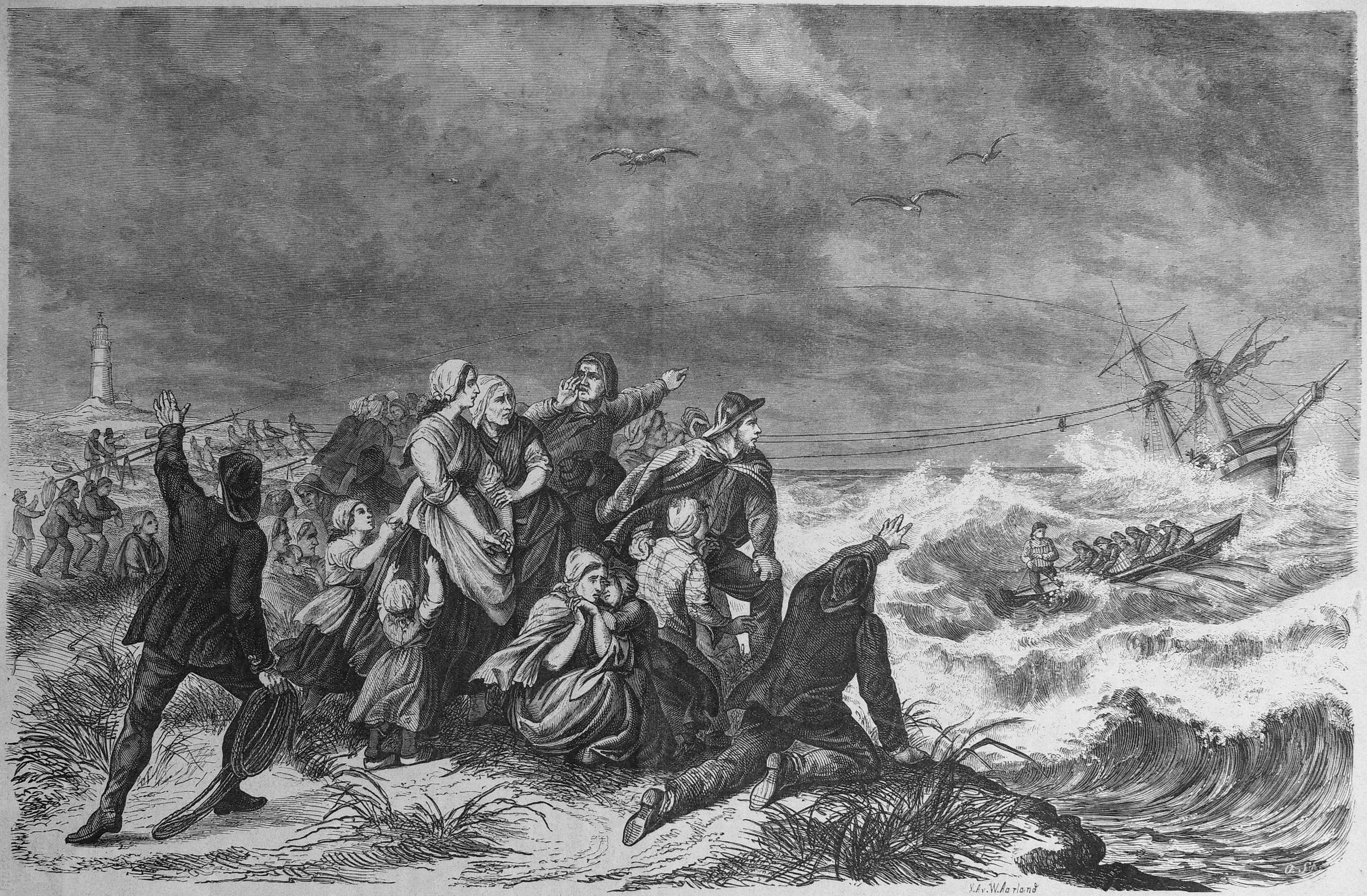 Original caption: “Rettung Schiffbrüchiger mittels Raketenapparat und Rettungsboot. (gezeichnet von X.Av. W.Aarland).”